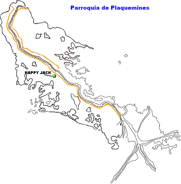 Happy Jack, Louisiana